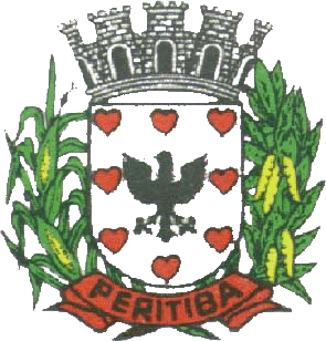 Blason de la municipalité de Peritiba - Brésil